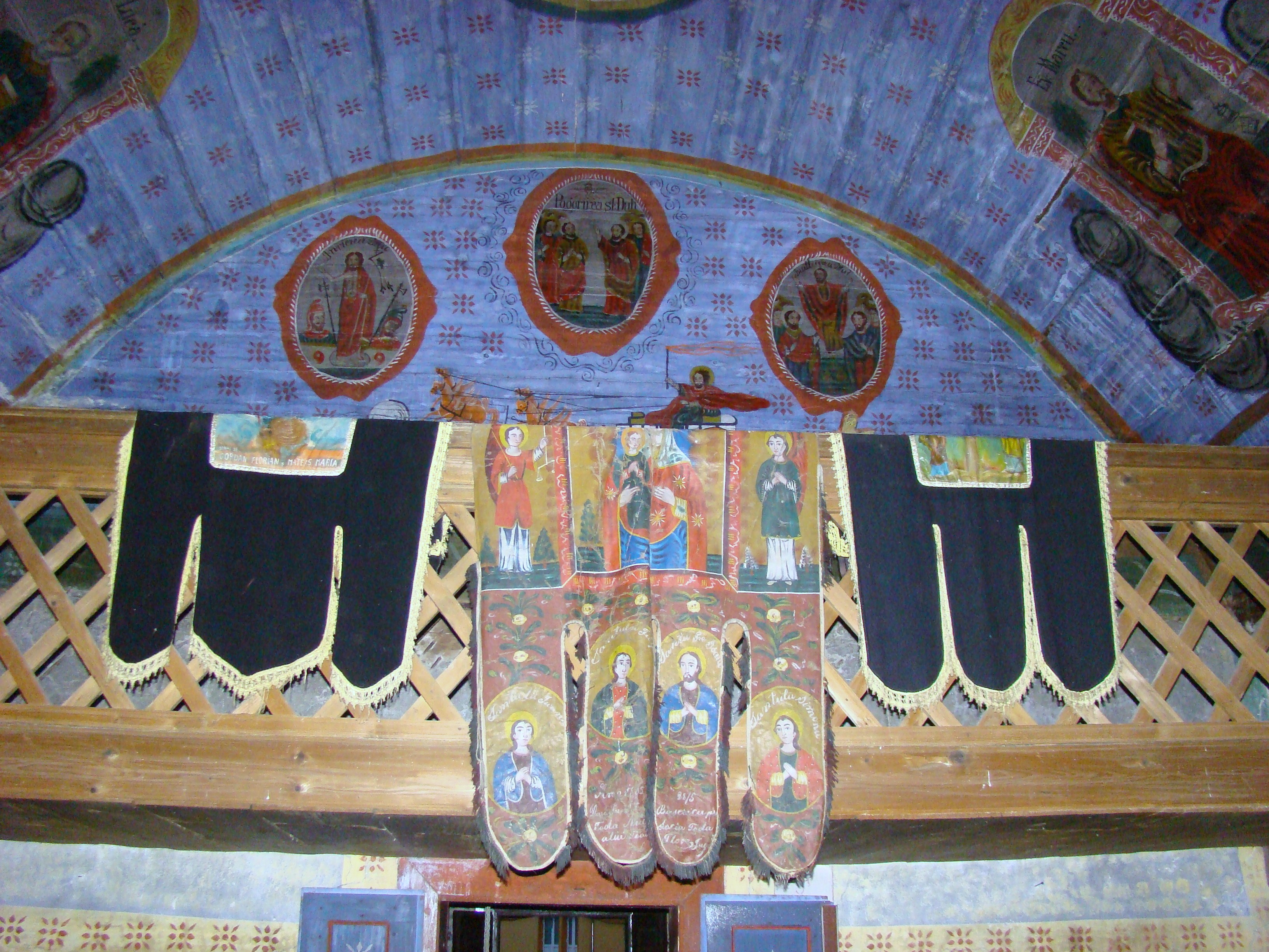 Biserica de lemn „Sfinții Arhangheli” din Remeți, județul Bihor